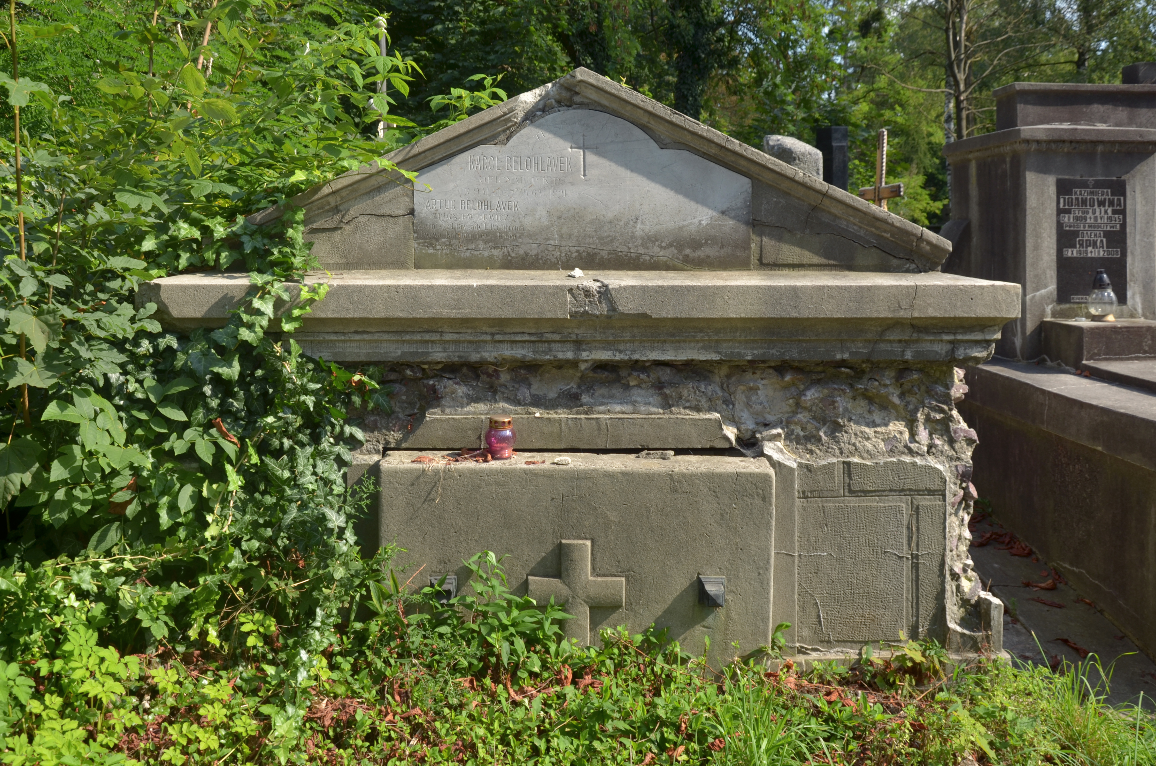 Гробівець родини Белоглавеків на Янівському цвинтарі у Львові.